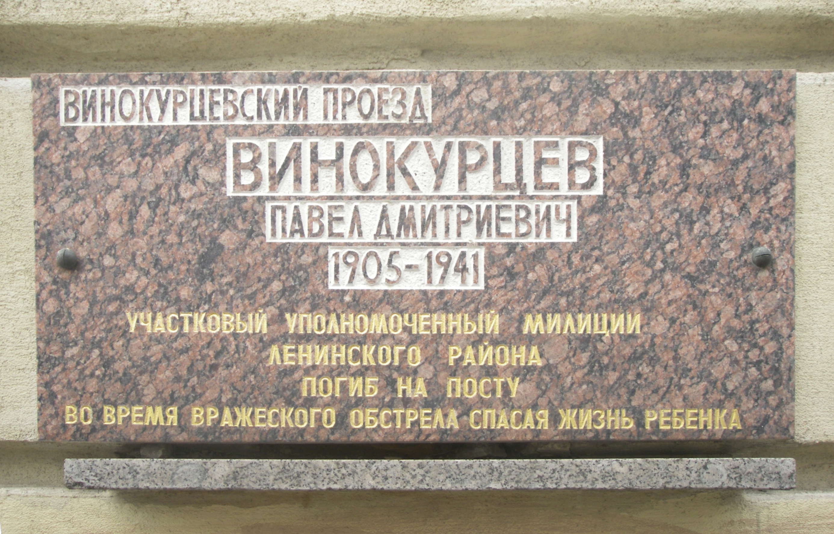 Гранитная доска на здании ст. м. Пушкинская, надпись "Винокурцевский проезд. ВИНОКУРЦЕВ ПАВЕЛ ДМИТРИЕВИЧ 1905–1941 Участковый уполномоченный милиции ленинского района погиб на посту во время вражеского обстрела спасая жизнь ребёнка". Санкт-Петербург.